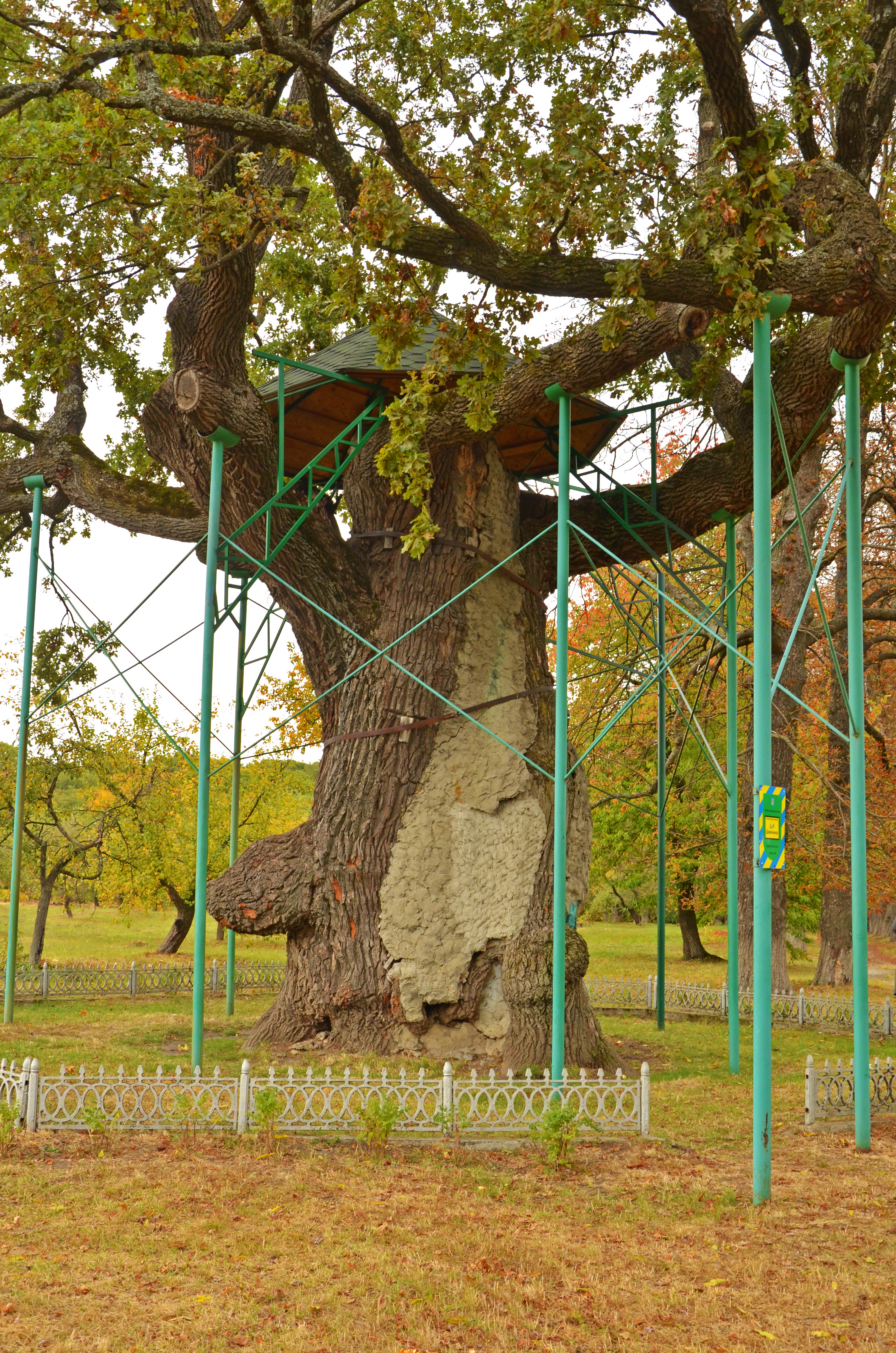 Дуби Т. Г. Шевченка, Звенигородський район, с. Будище, садиба Шевченківського с/г коледжу